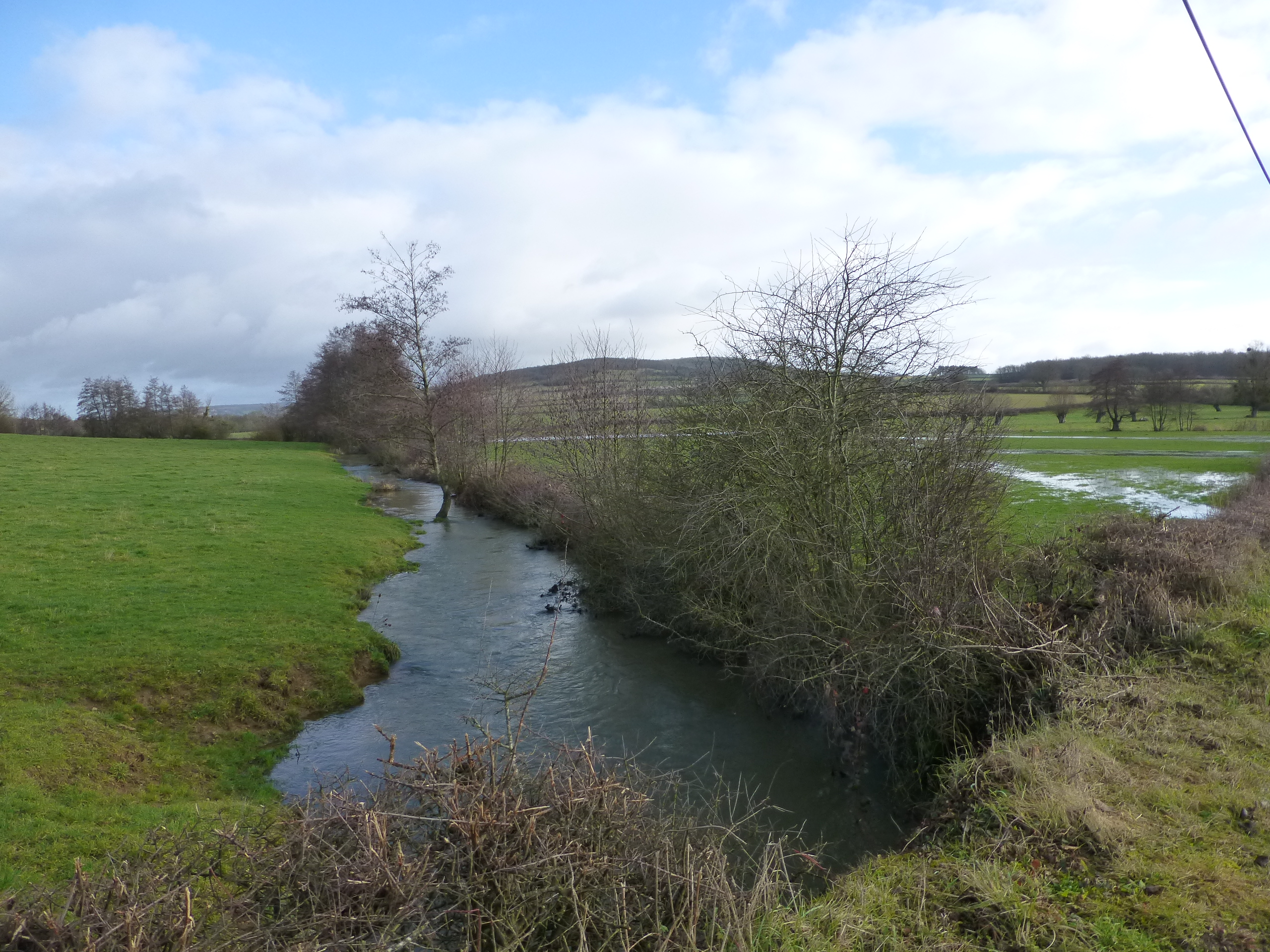 La rivière Guye à Savianges